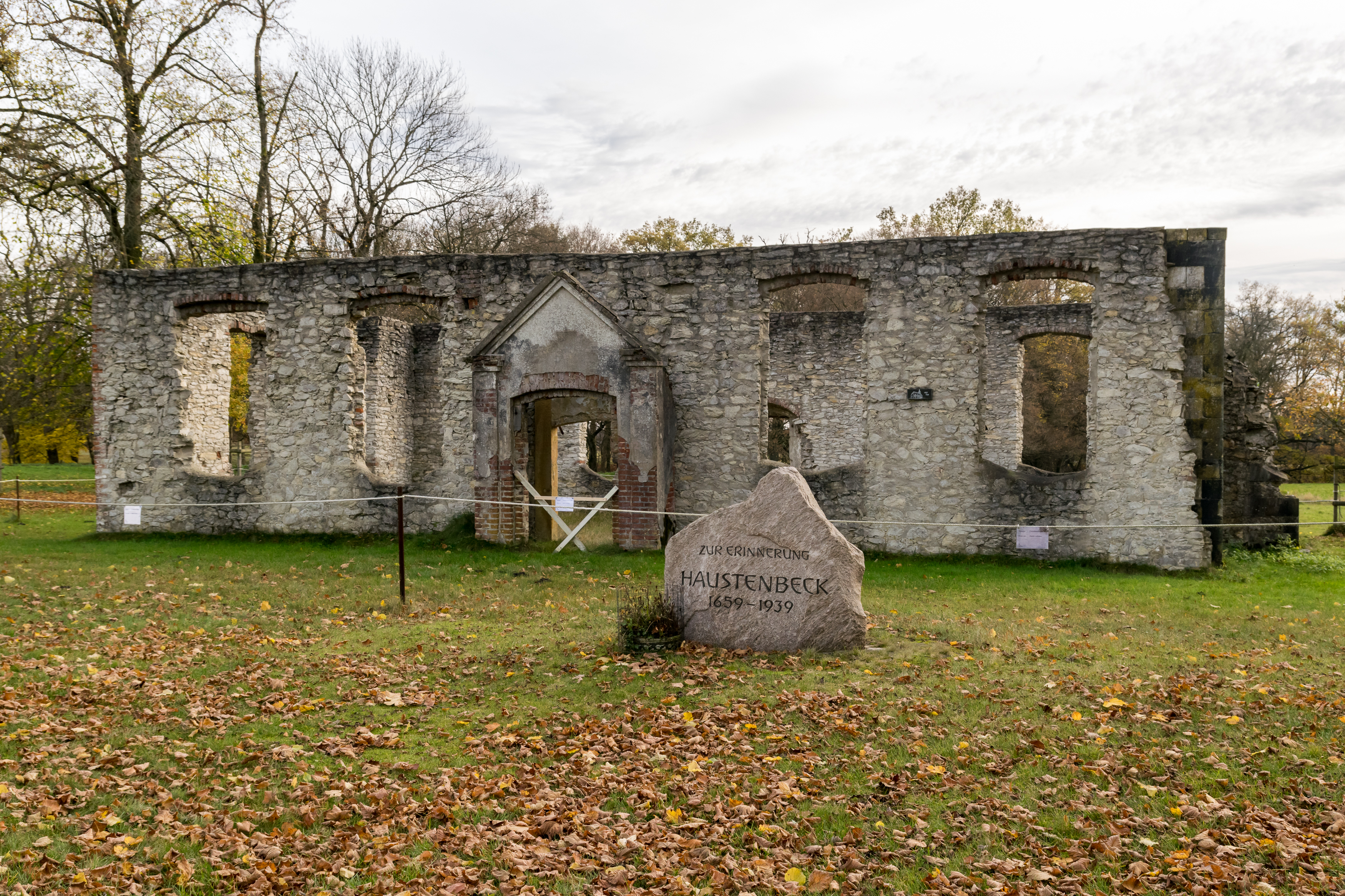 Kirchenruine in Haustenbeck; Dorf und Kirche 1939 zugunsten des Truppenübungsplatzes Senne aufgegeben.